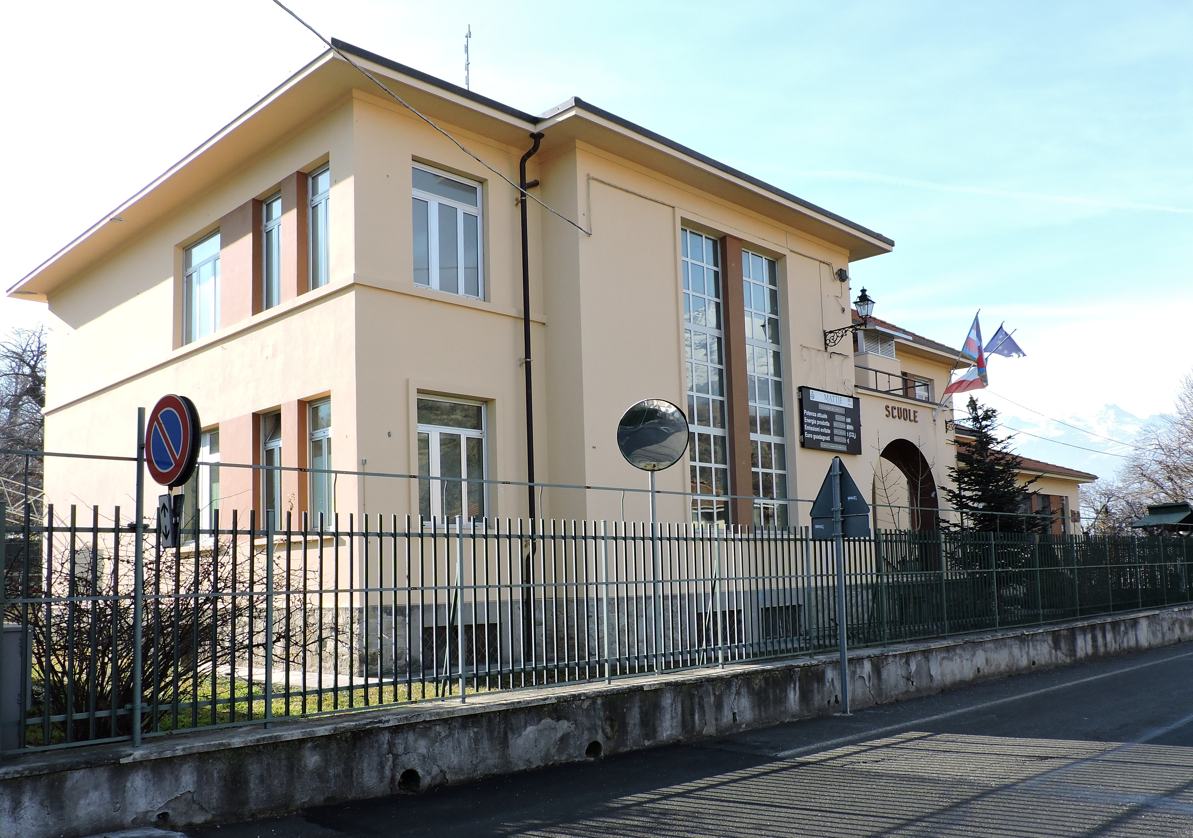 Mattie (TO): municipio e scuole